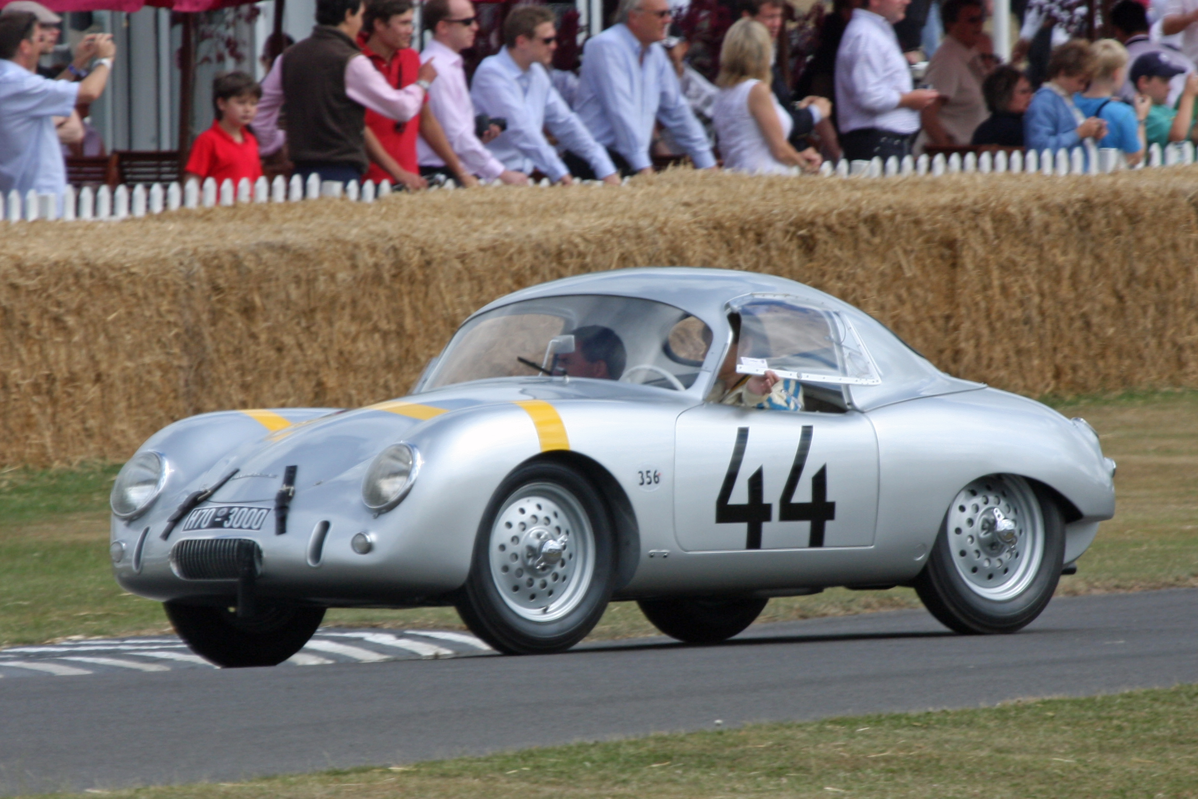 1952 Porsche 356 Glöckler Special